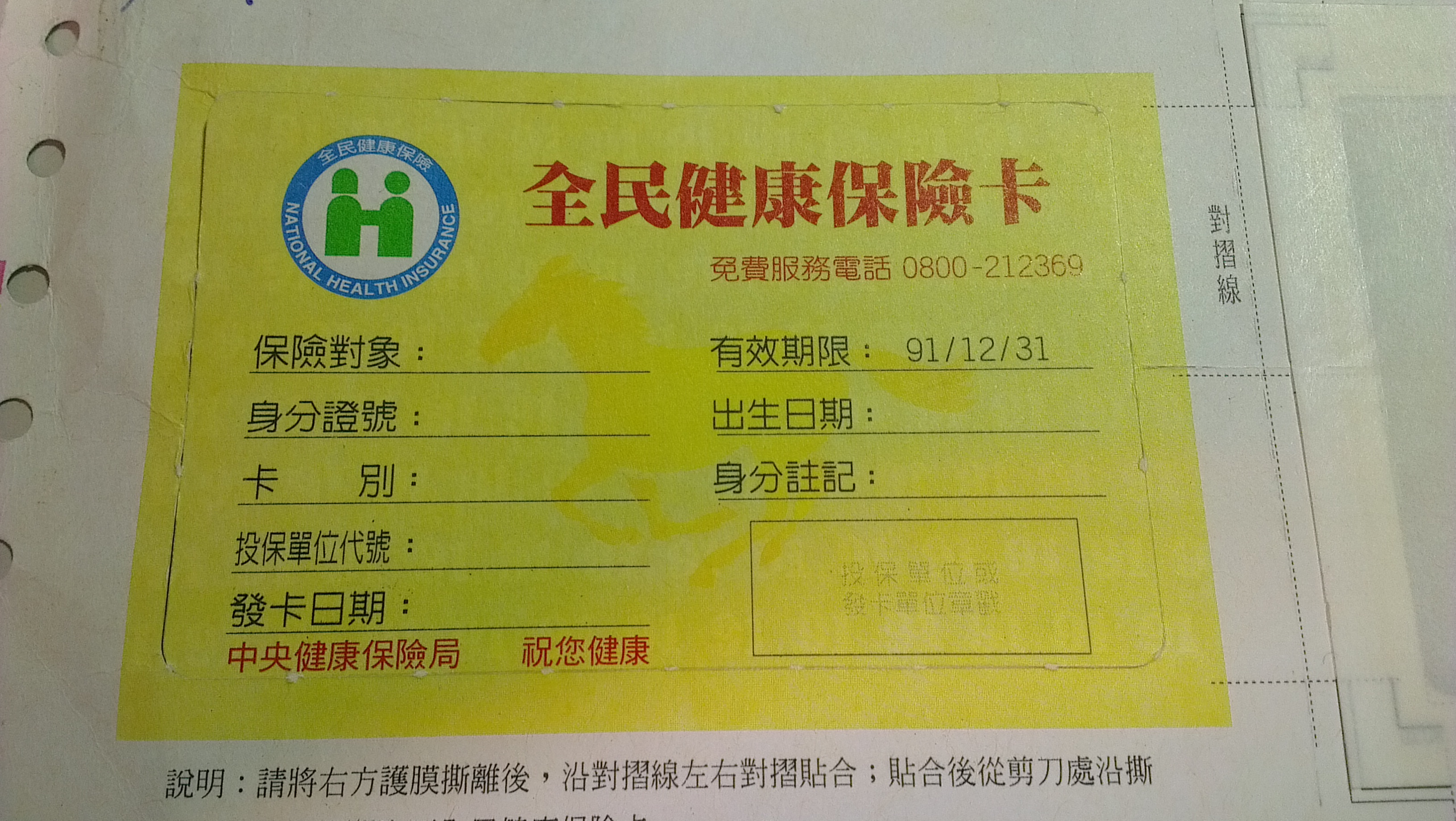 中華民國行政院衛生署中央健康保險局早期發行的全民健康保險紙卡